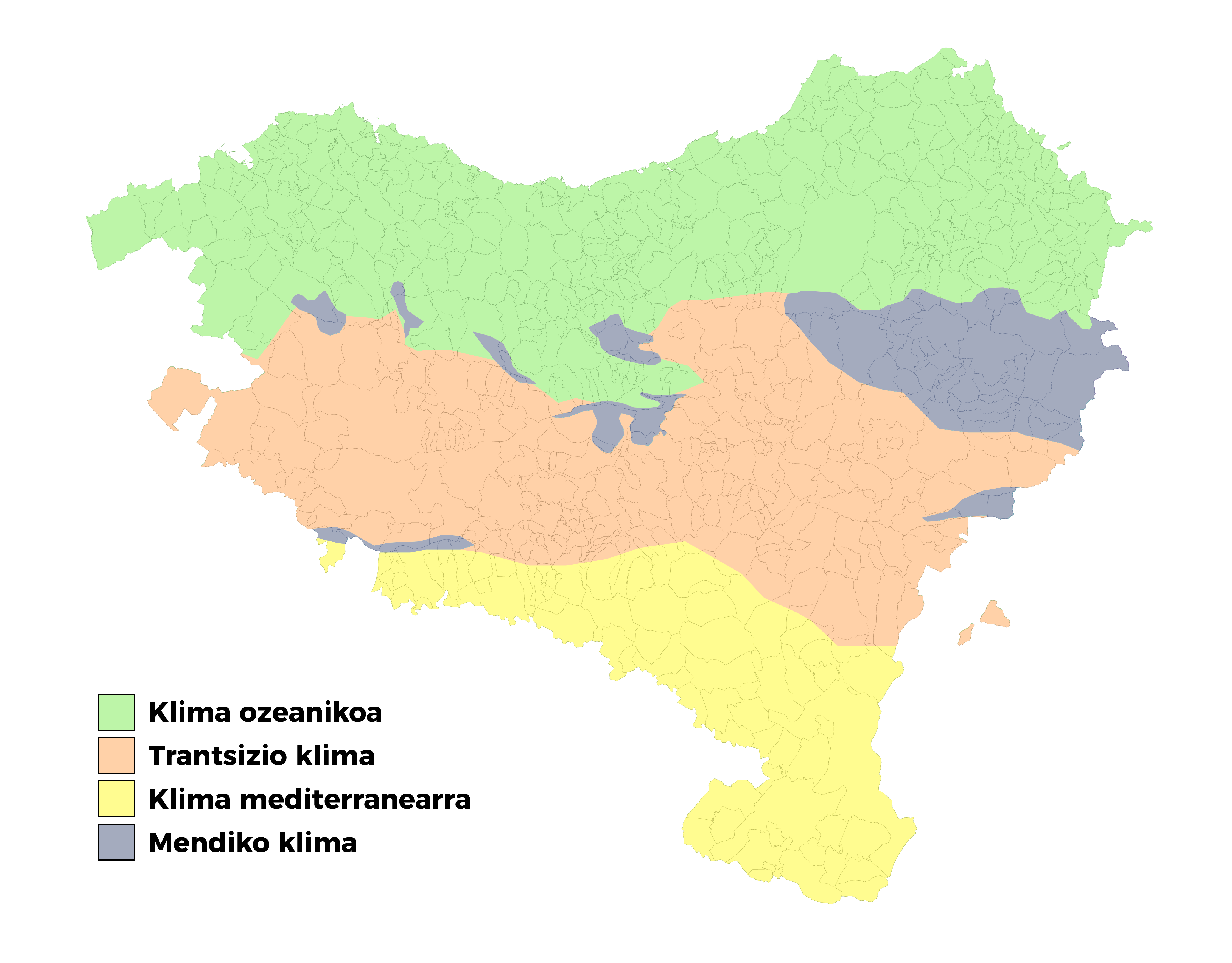 Euskal Herriko mapa klimatikoa